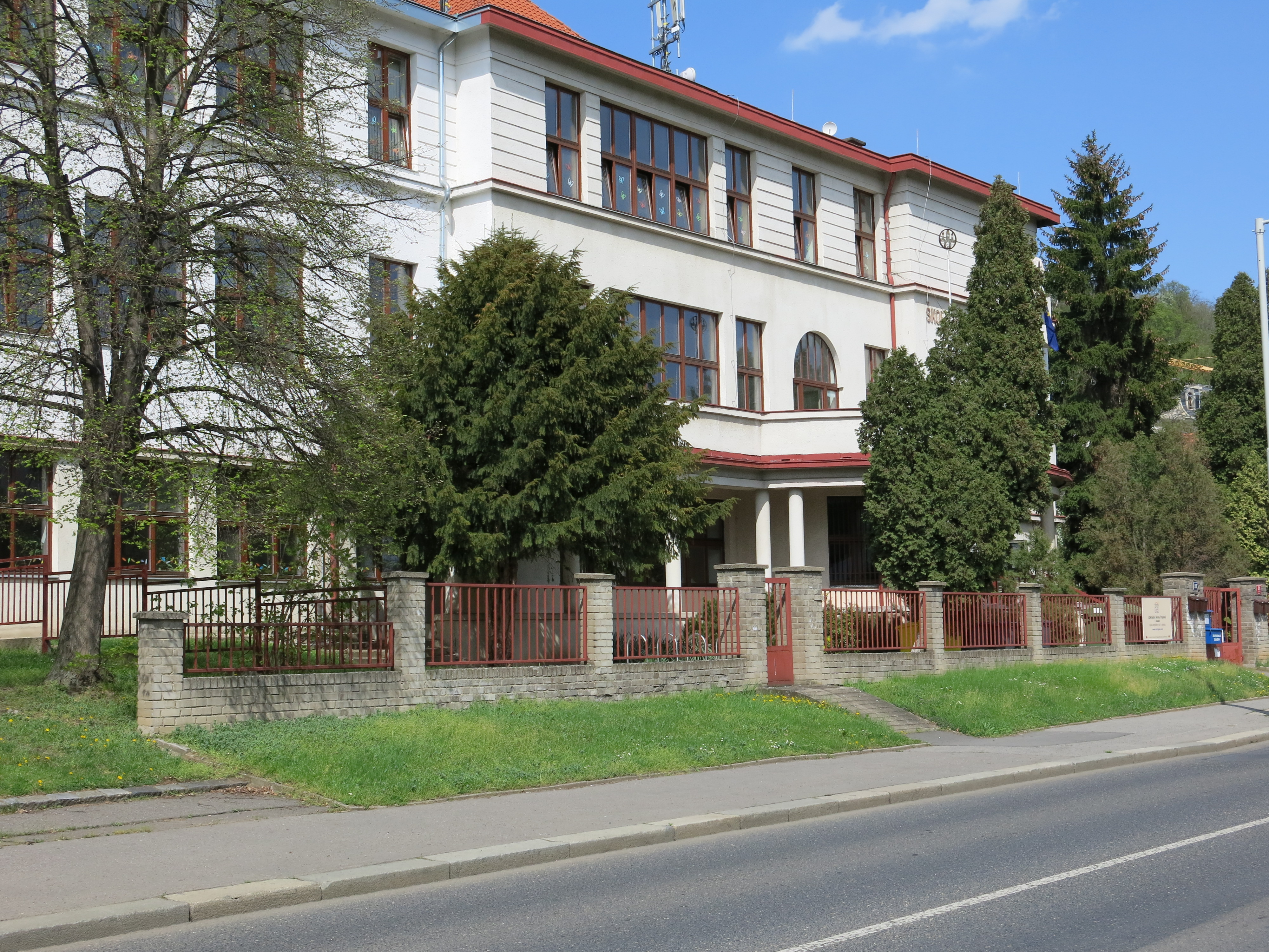 Euroškola Praha - Troja